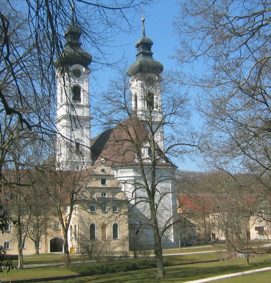 Zwiefalten, Germany: Abtei